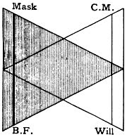 באיור זה, ארבעת ה"כוחות" מסודרים על המשולשים כך שה"מסכה" ו"גוף הגורל" נמצאים בשיא ההתפשטותם לכיוון קוטב ה"יסוד" וה"שכל היוצר" ו"כוח הרצון" נמצאים בשיא התפשטותם לכיוון קוטב ה"ניגוד". זאת על פי מחשבתו של המשורר האירי ויליאם בטלר ייטס.